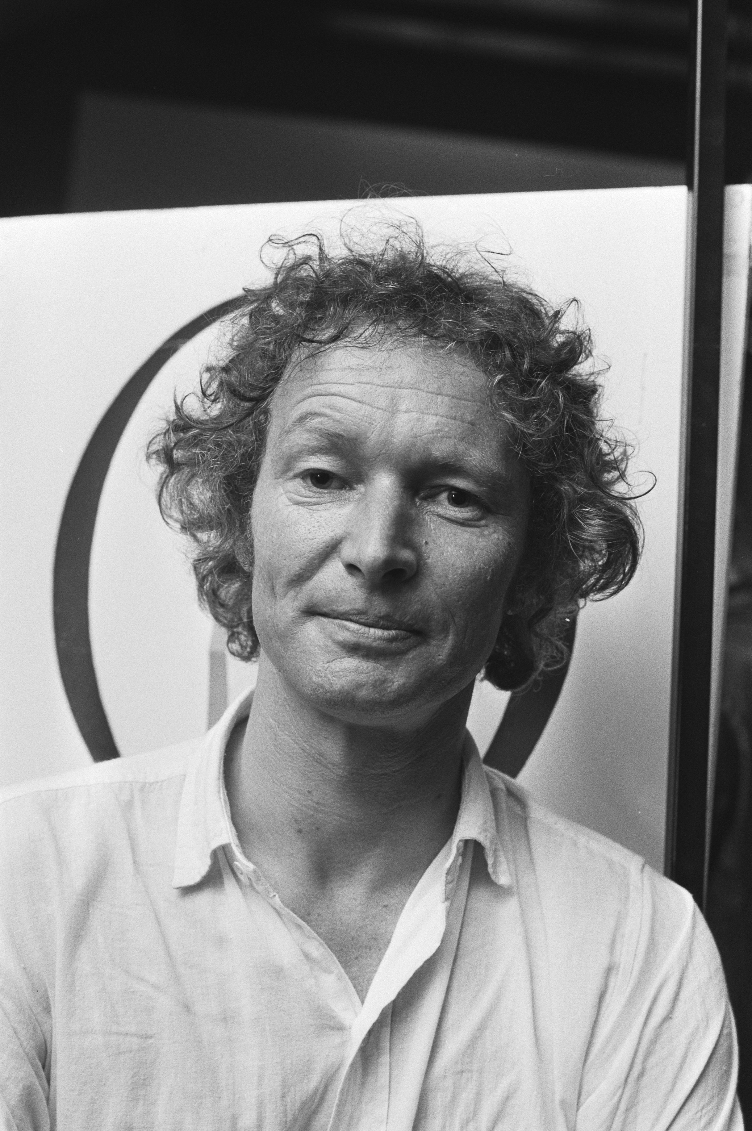 Collectie / Archief : Fotocollectie Anefo Reportage / Serie : Boekeninformatiebeurs "Vers voor de Pers" in Krasnapolsky in Amsterdam Beschrijving : Schrijver Guus Kuijer Datum : 10 september 1979 Locatie : Amsterdam, Noord-Holland Trefwoorden : beurzen, portretten, schrijvers Persoonsnaam : Kuijer, Guus Instellingsnaam : Krasnapolsky Fotograaf : Bogaerts, Rob / Anefo Auteursrechthebbende : Nationaal Archief Materiaalsoort : Negatief (zwart/wit) Nummer archiefinventaris : bekijk toegang 2.24.01.05 Bestanddeelnummer : 930-4335